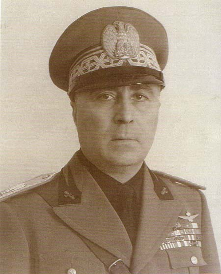 Roberto Farinacci, in uniforme da Luogotenente Generale della M.V.S.N., in una foto del 1940.